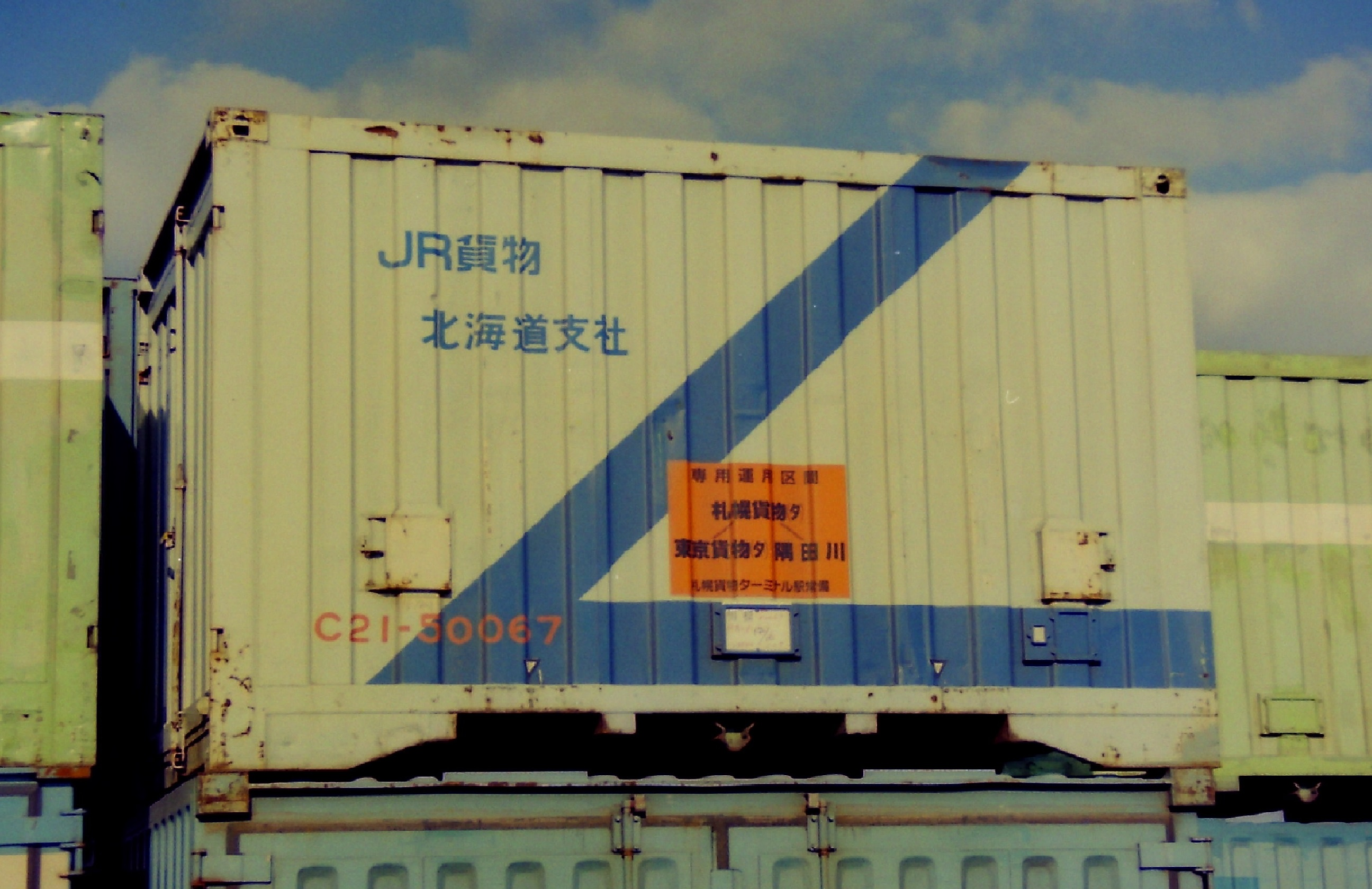 撮影地＝【大阪(タ)】